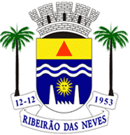 Brasão do município de Ribeirão das Neves, cidade região metropolitana de Belo Horizonte, no estado de Minas Gerais, Brasil.